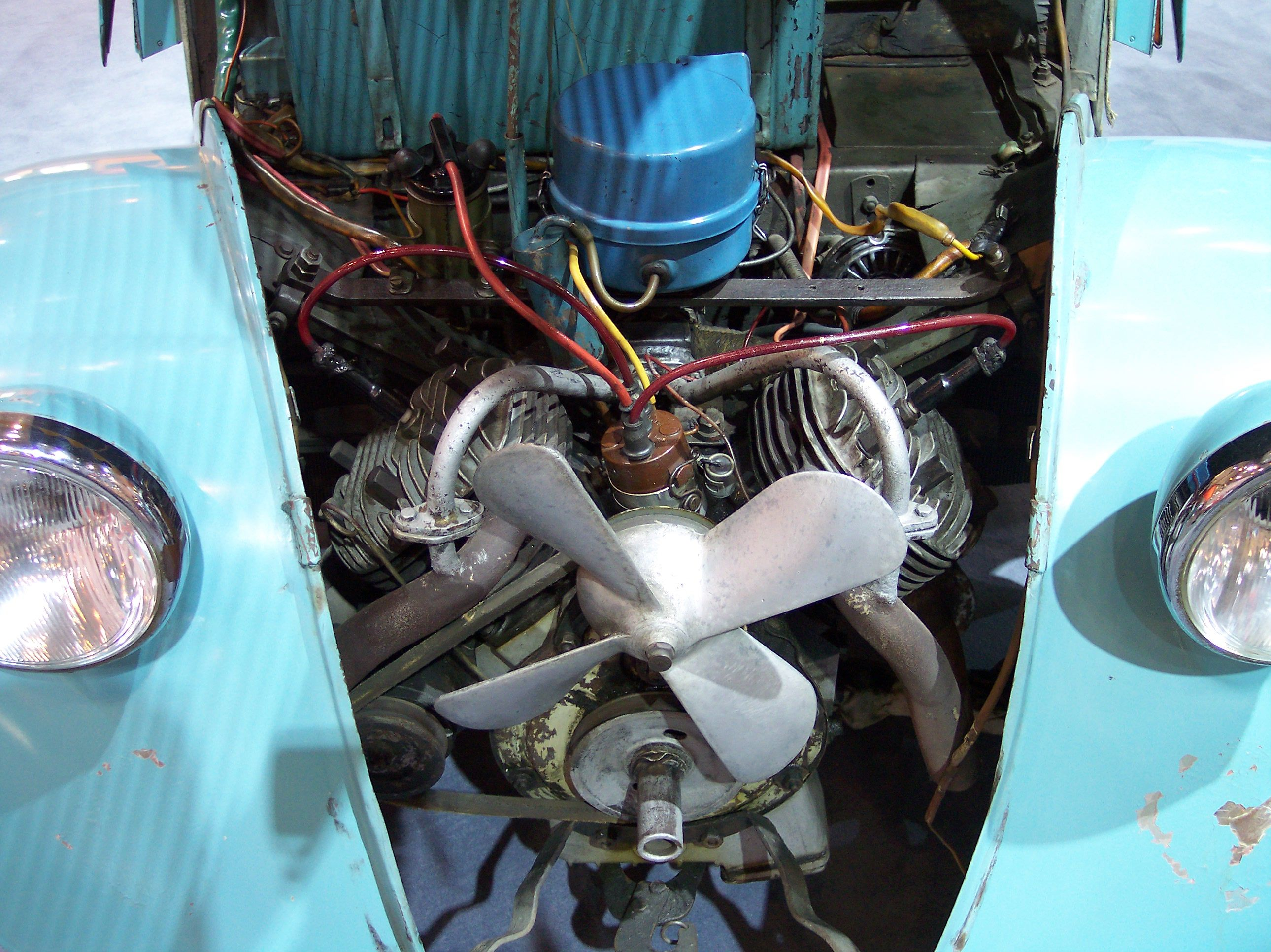 Skoda Sagitta 911 Prototype engine